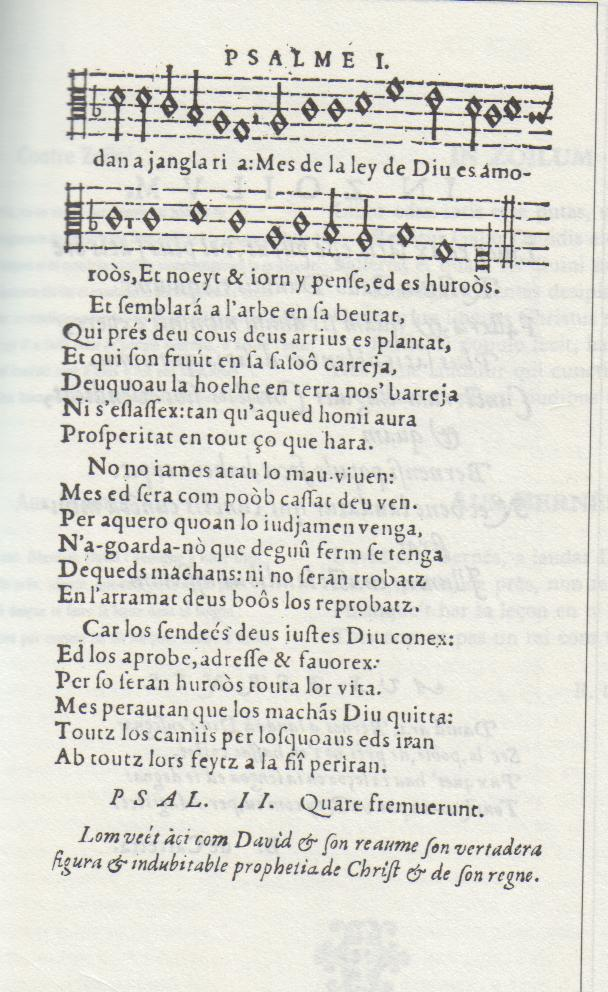 L'obra de Saletas qu'a mantun sègles, qu'ei libra de drets. Lembeye